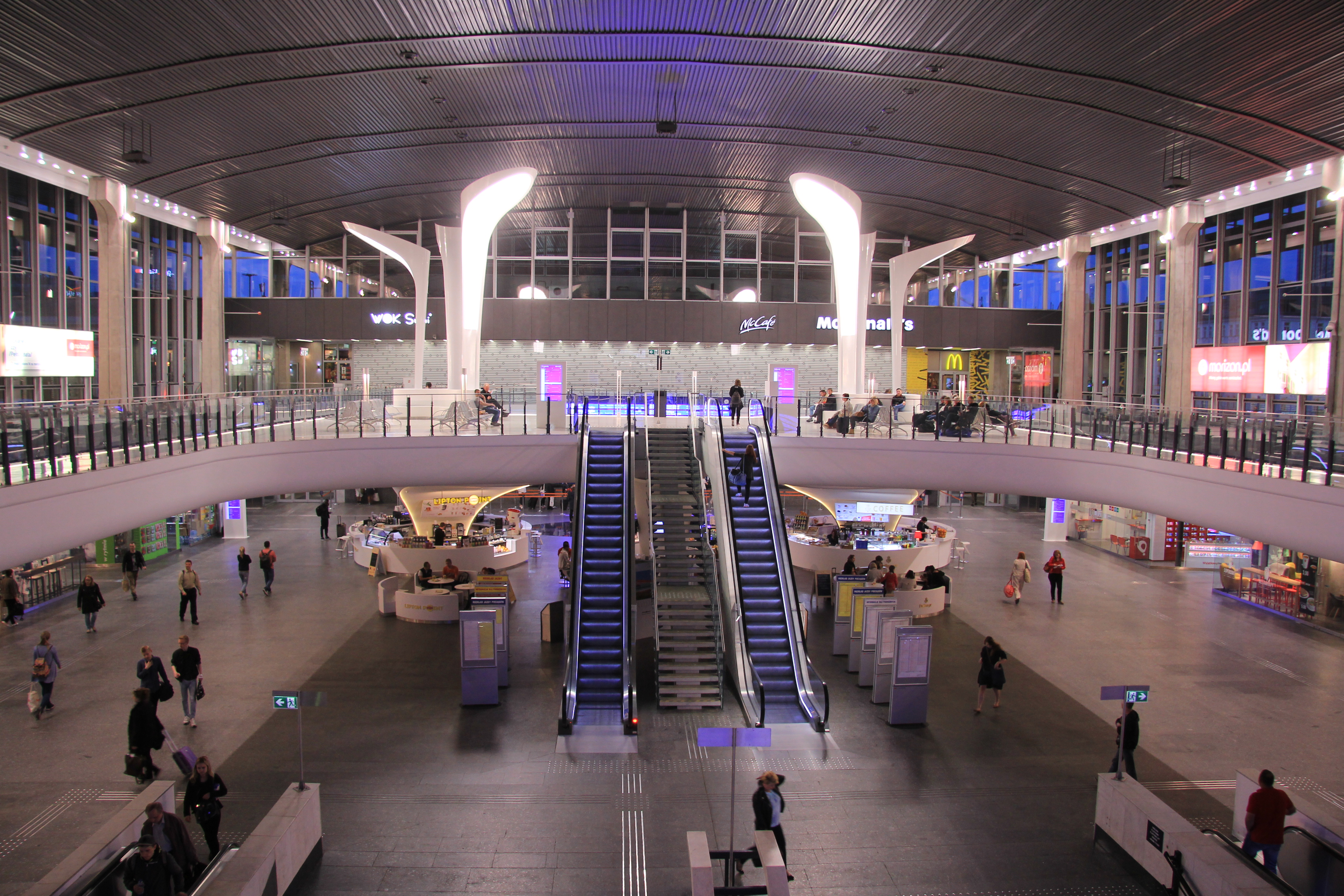 Warszawa Centralna - wnętrze